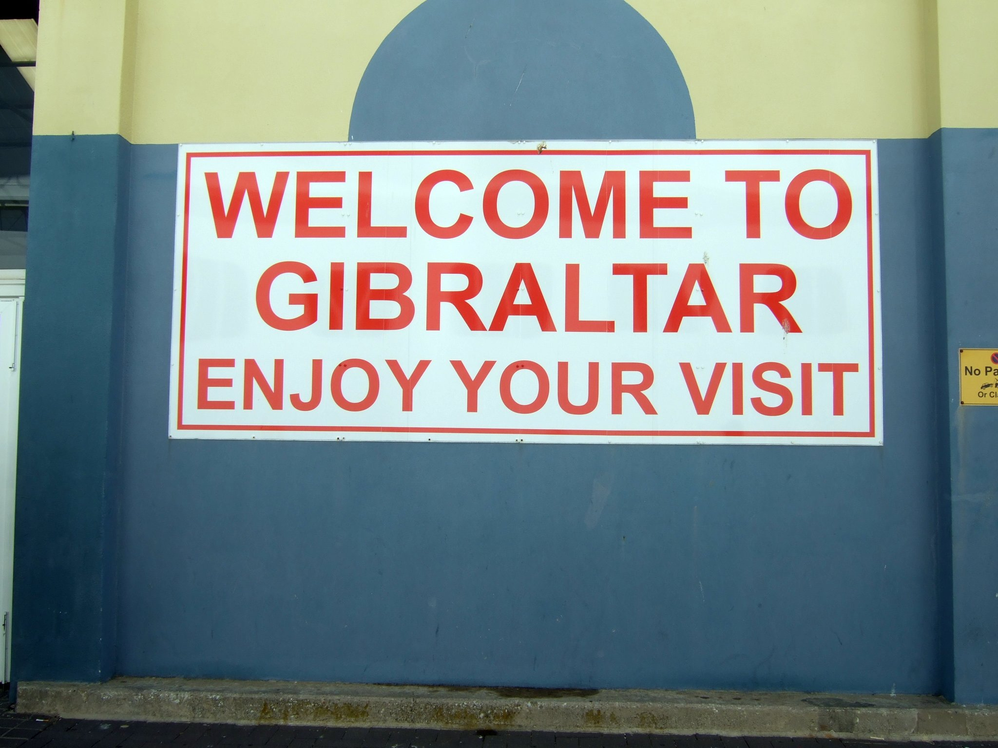 Gibraltar welcome sign